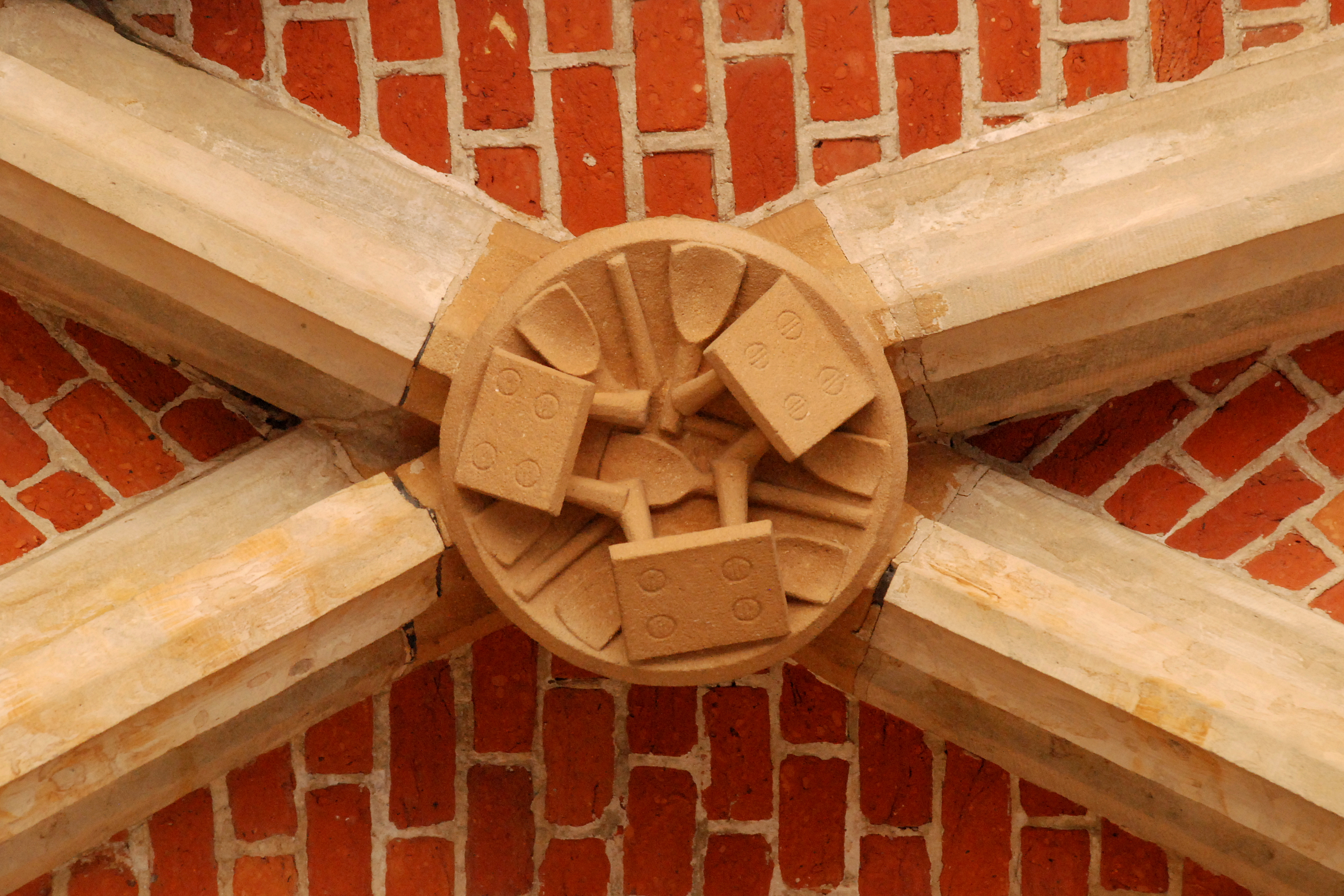 Belgique - Bruxelles - Grand-Place - Hôtel de Ville - Maison de l'Estrapade (Scupstoel)